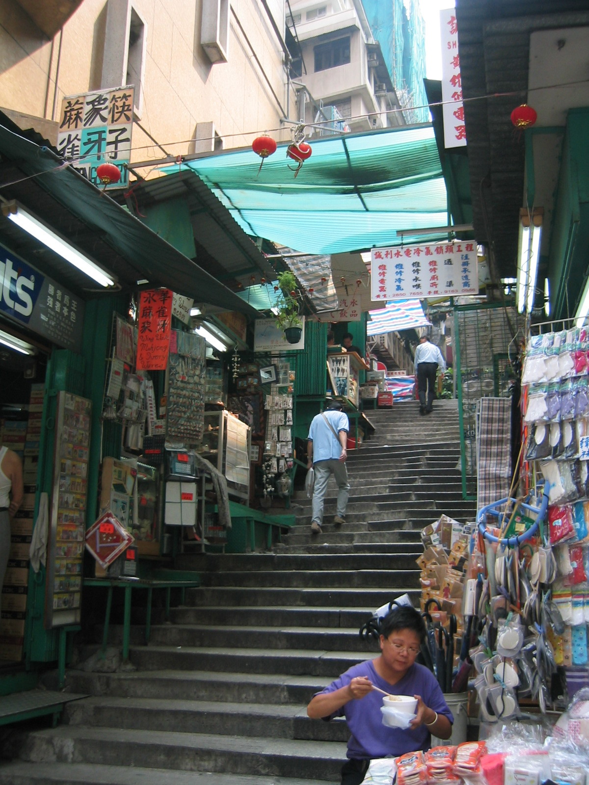 Aberdeen Street, Central, Hong Kong